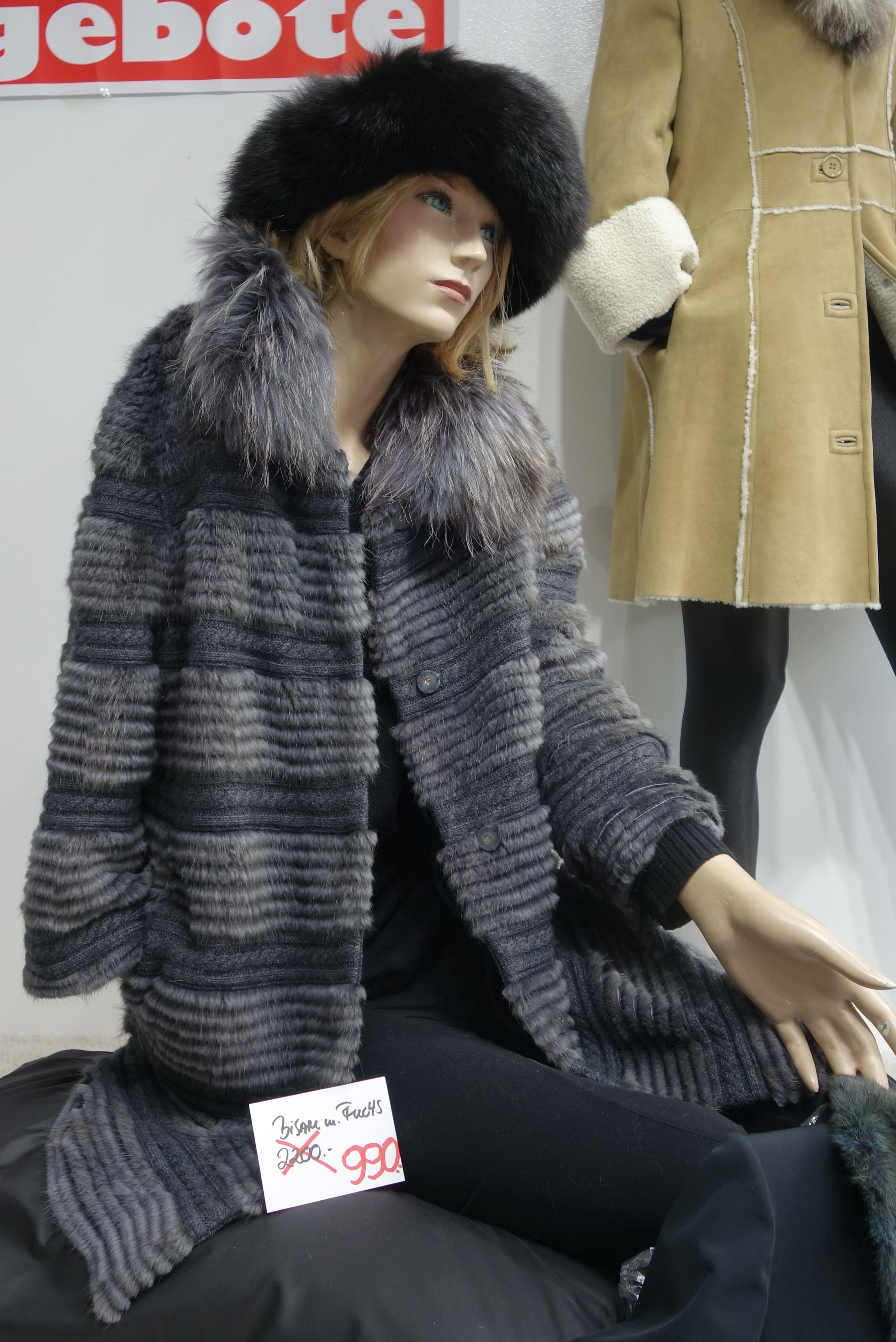 Jacke aus gefärbtem, galoniertem Bisamfell (vorn), im Hintergrund ein nappierter Lammmantel. Gesehen im Pelzhaus Schenkenbach, Düsseldorf.